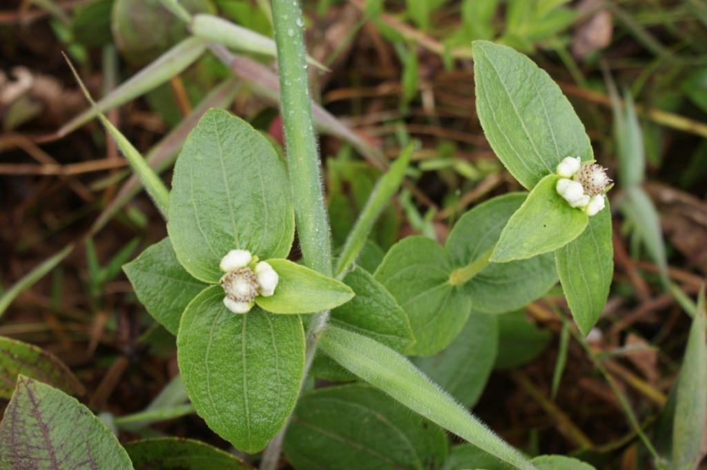 Ichthyothere elliptica - ASTERACEAE Parque Estadual da Serra dos Pirineus - Pirenópolis - Goiás - Brasil.